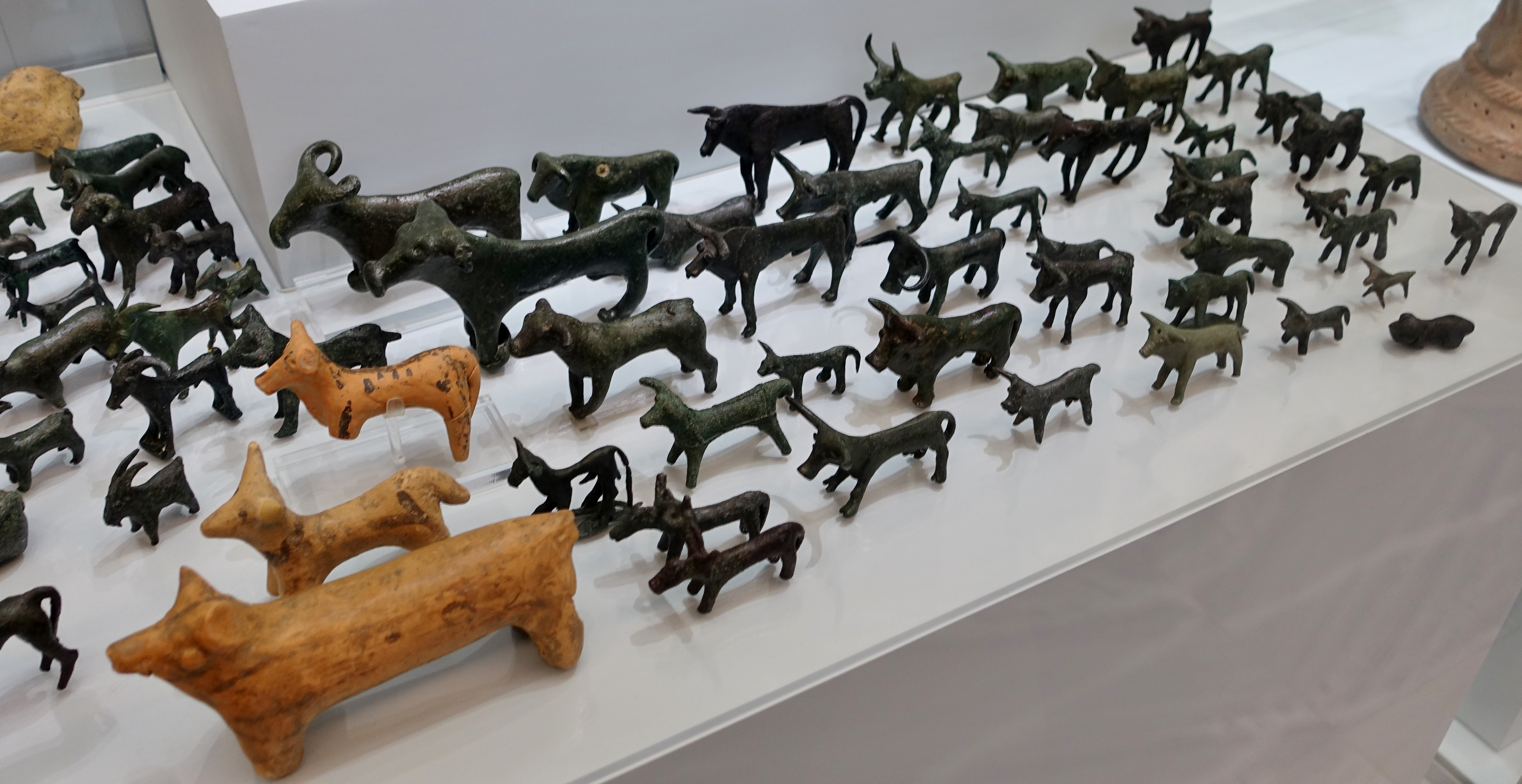 Tierfiguren, hauptsächlich Rinder und Ziegen (Geometrisch-Archaische Zeit, 8. bis 7. Jahrhundert v. Chr.), gefunden im Heiligtum des Hermes und der Aphrodite bei Symi, Archäologisches Museum von Iraklio, Kreta, Griechenland